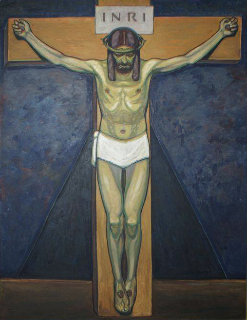 Studie zum Kruzifix-Bild in der Pauluskirche Ulm; Ulmer Museum; Dauerleihgabe der Adolf-Hölzel-Stiftung